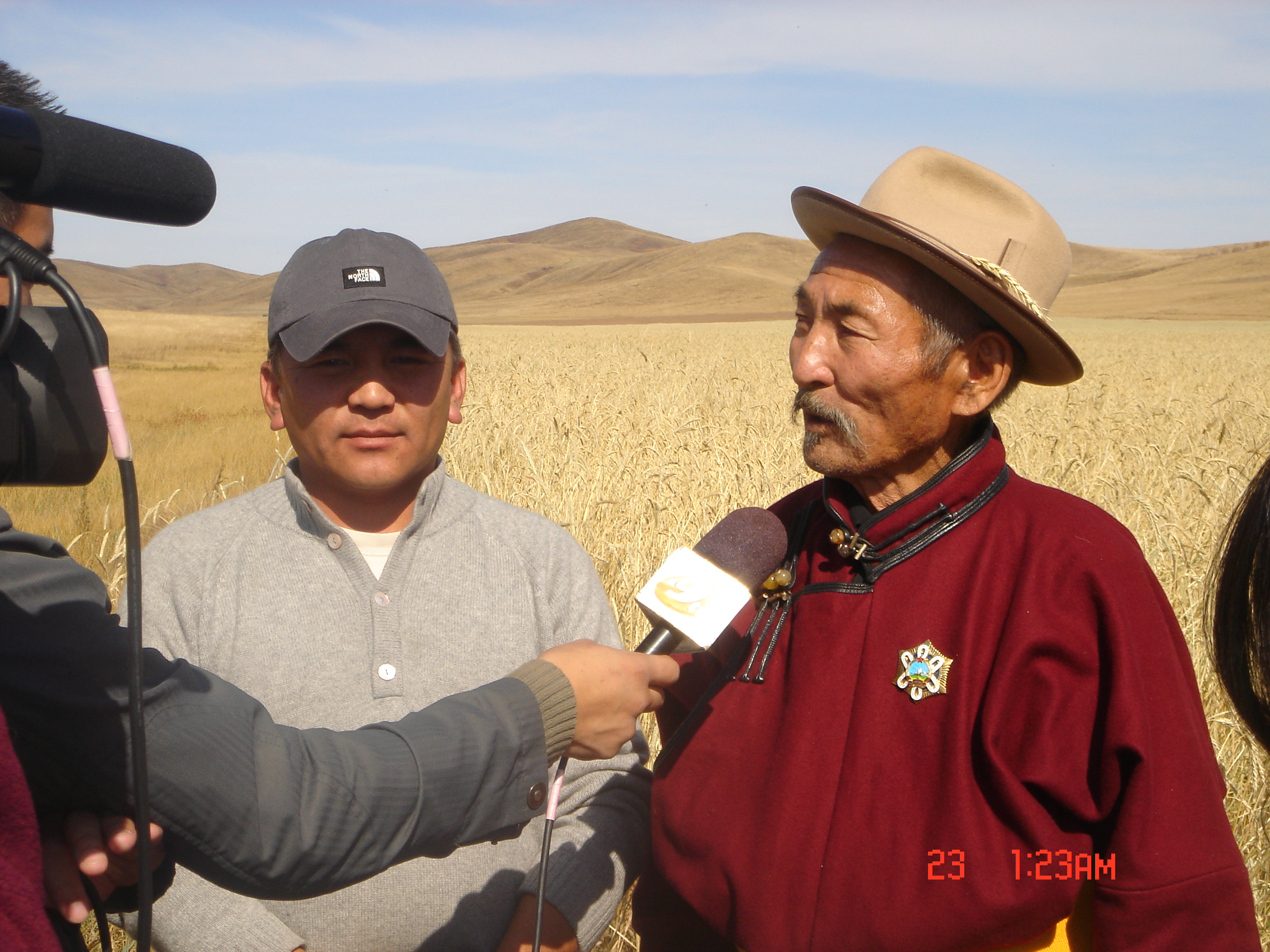 Монгол: Д.Батаа "Хөдөлмөрийн хүндэт медаль", "Алтан гадас" одонгоор тус тус тариан талбайд шагнуулсан.